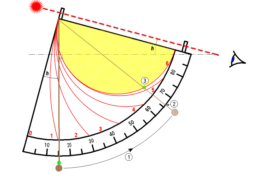 Différentes étapes pour régler un quadrant ancien simple avant de prendre l'heure.